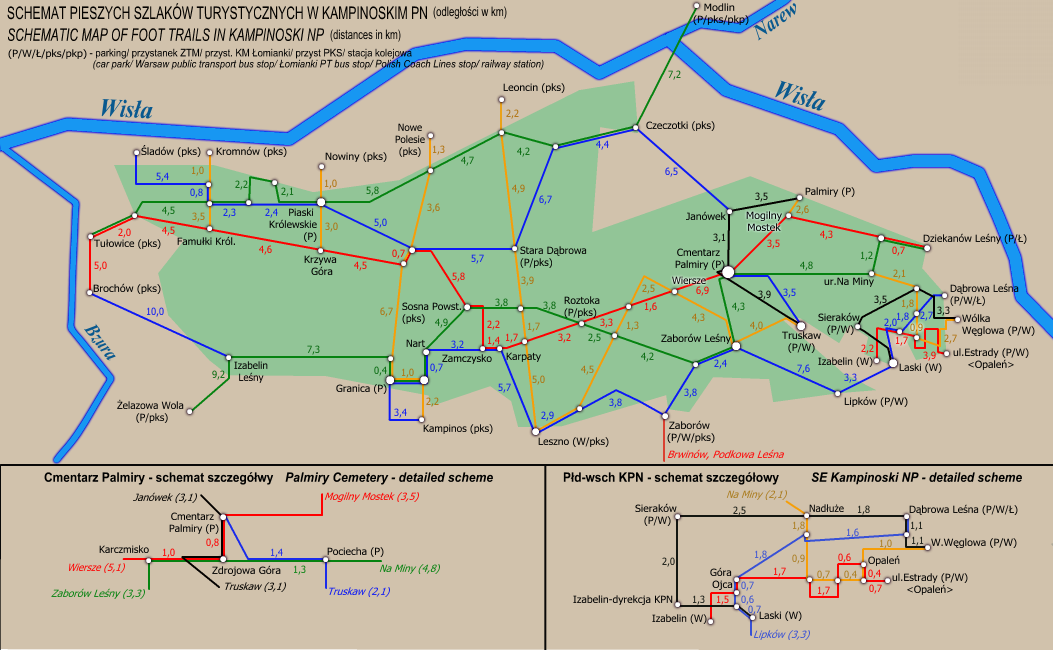 Schemat pieszych szlaków. Pierwotna grafika autorstwa Kerguelena.